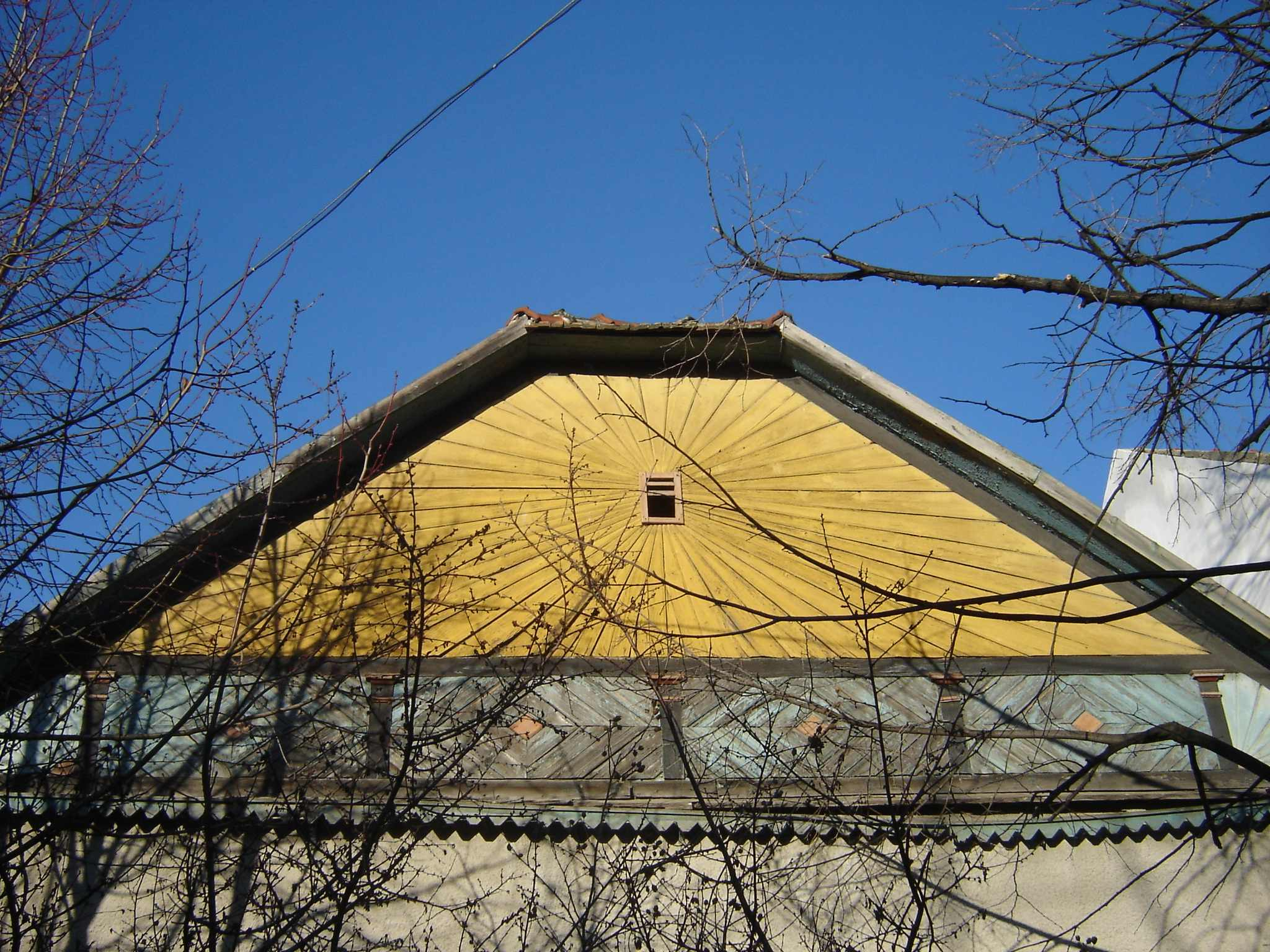 Szeged Alsóváros Napsugaras ház oromzata (18??-2006) hu:2006-ban elbontva. Pataki Márta saját felvétele hu:2005 novemberében. Az oromzat elemzése: A szögletes szellőző nyílásból áradnak az okkersárga napsugarak, alatta az egy zsalugátersáv 6 rekeszből áll. A kétféle kékre színezett 4 gérbélést két legyező fogja közre. A napsugár-motívum az alapja a legyezőknek is, ez utóbbiakat az alsóvárosi és a belvárosi temetőben a sírköveken is alkalmazták. Ezen az oromzaton a több szín használata az eredetiségre való törekvést mutatja, a XIX. százazadban az oromzatokon világosabb és sötétebb árnyalatok váltották egymást, de több szín használatáról is vannak hírek. A háromszög alakú oromzatot a szinte csipkésre formázott esővető deszka zárja le. Az egész oromzat alapanyaga a fa, amely eredendően meleget és derűt sugároz, általa meghitté, barátságossá válik az emberi lakókörnyezet. Az utcai fásítás, bokrosítás és virágtermesztés még fokozza a természethez való közelséget. A fák és a virágok élőhelyet és táplálékot biztosítanak a madaraknak, a méheknek. Licensing ap tetején látható kép egy Creative Commons Licenc alapján használható fel. A képre vonatkozó pontos licenc neve Creative Commons Forrásjelölés licenc v2.5 (Attribution License v2.5), röviden ismert nevén „cc-by-2.5”. For visitors from other countries: This image has been released under the Creative Commons Attribution License v2.5 (cc-by-2.5)